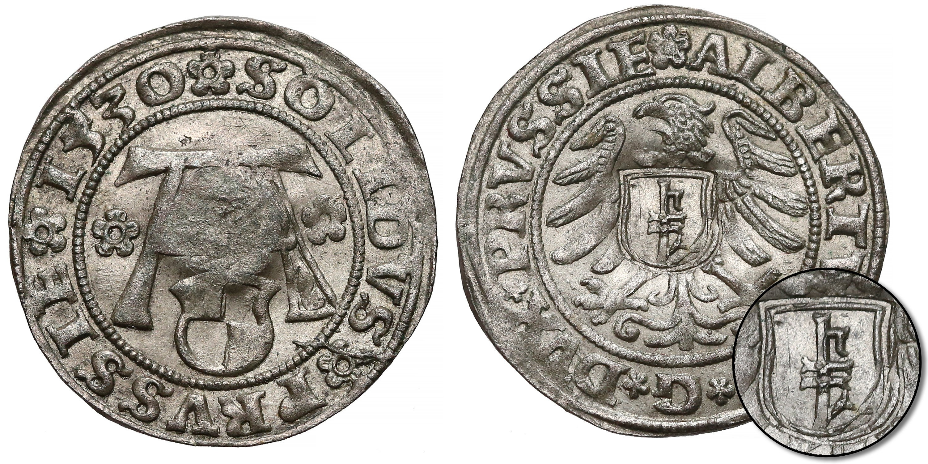 Oblężenie Gdańska 1577 kontrmarka na szelągu pruskim